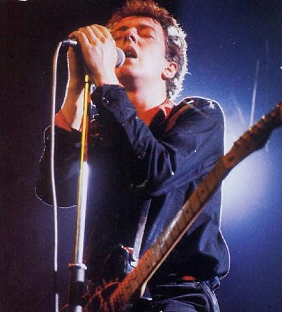 joe strummer singing